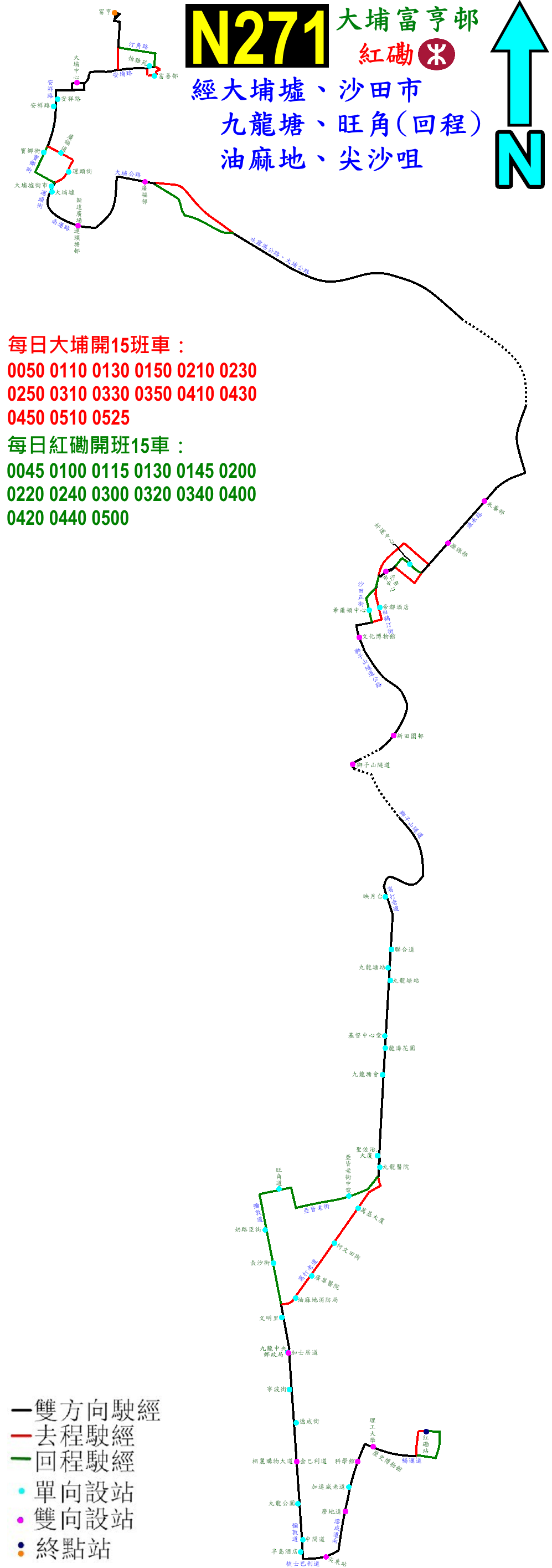 中文（香港）: 九巴N271線的走線圖